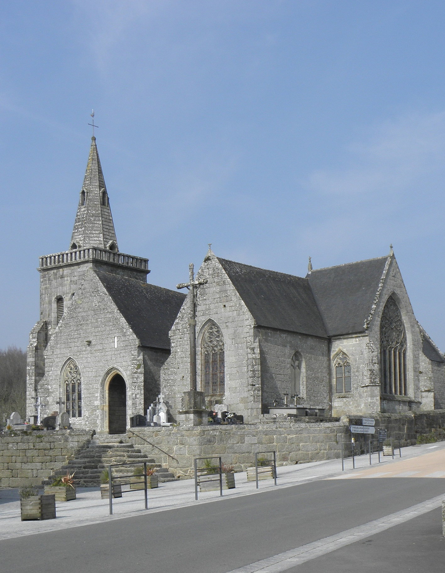 Église Notre-Dame sise à Canihuel (22). Chevet et flanc sud.